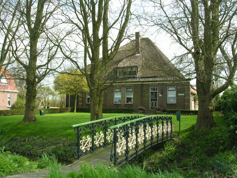 Een kleine brug naar een stolpboerderij in Westerwijzend. A small bright to a farm in the hamlet Westerwijzend.